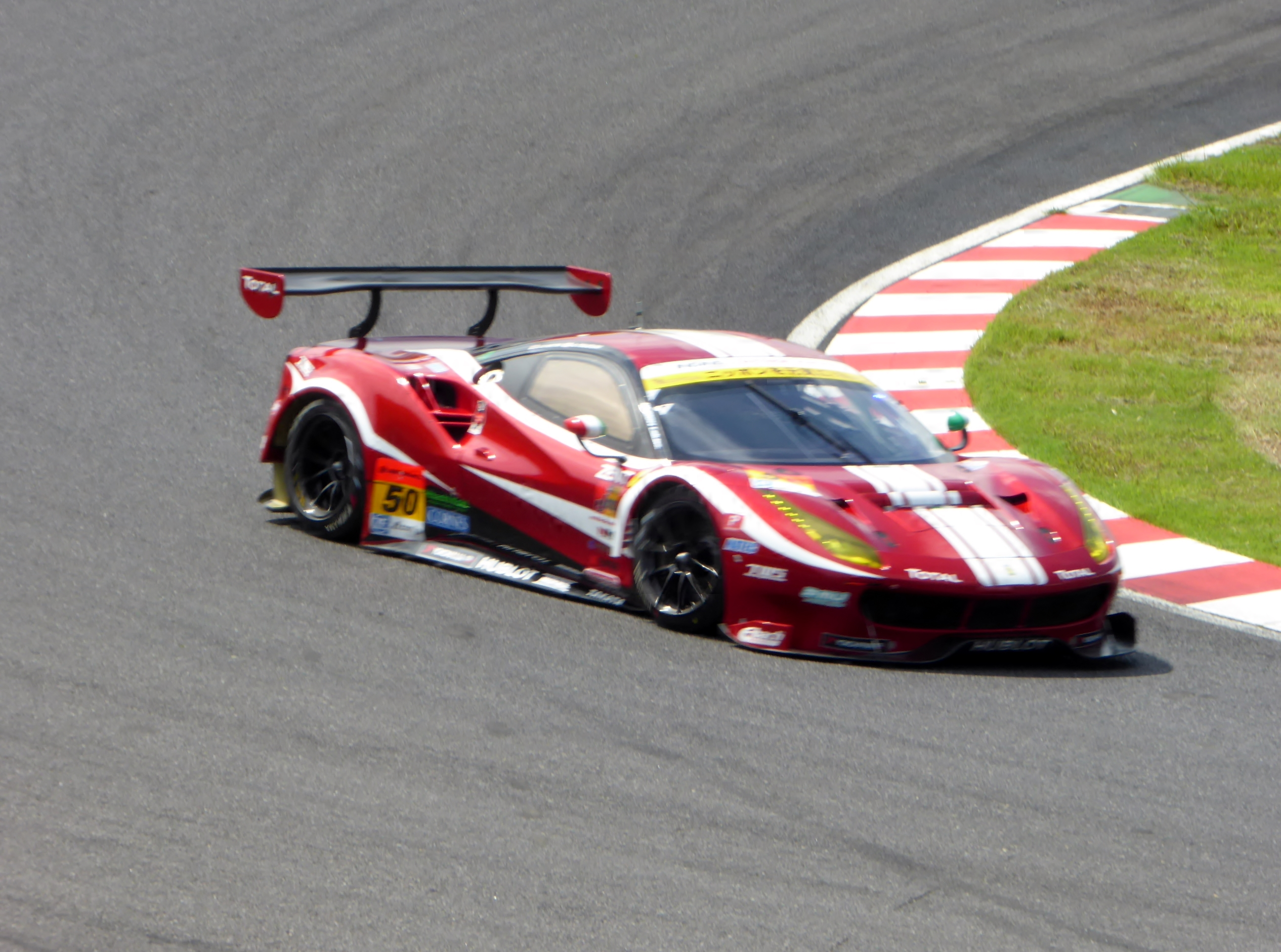 2017年鈴鹿1000kmに於いて50号車Ferrari 488 GT3を撮影。